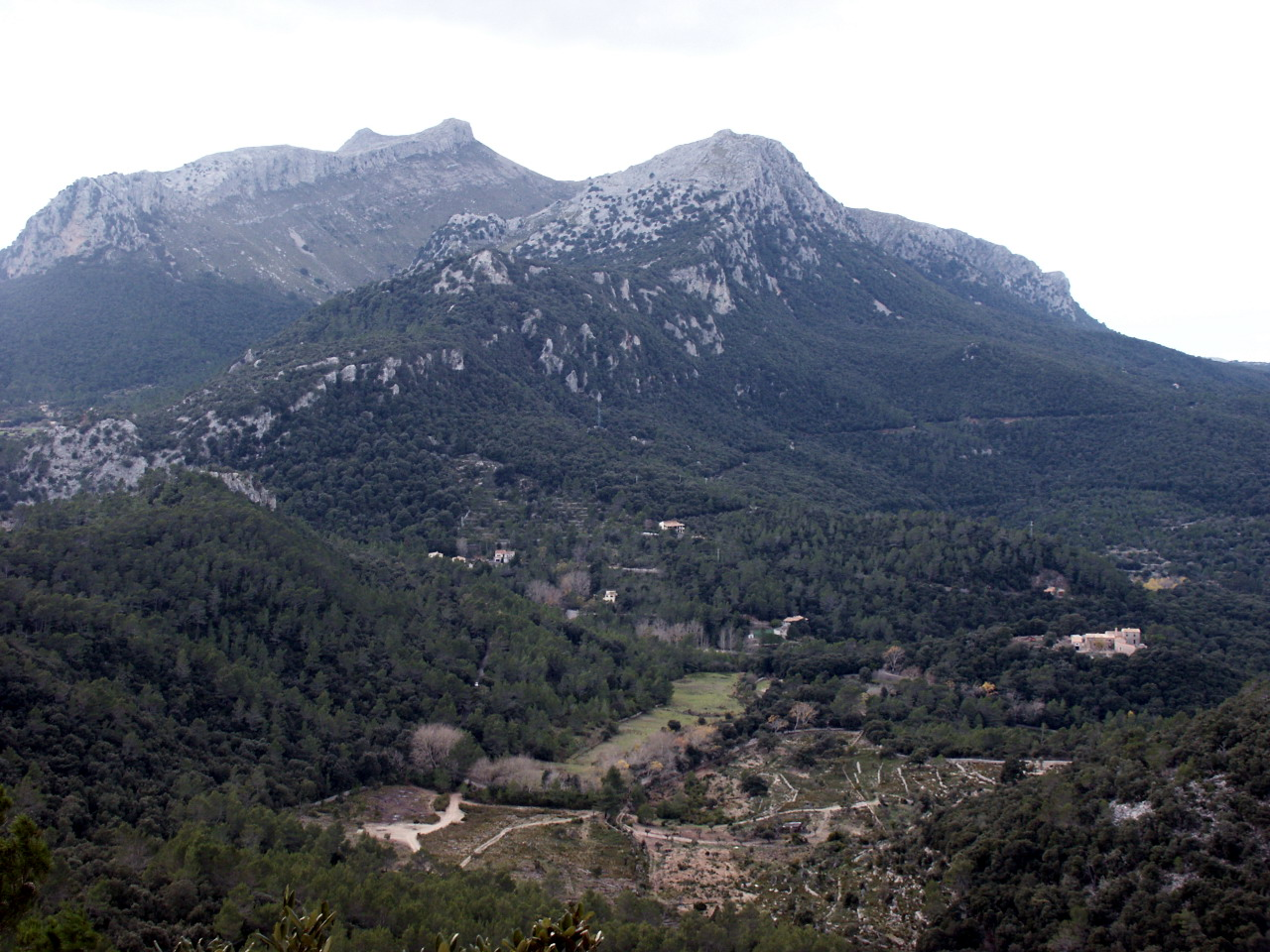 El Massanella i en Galileu. Escorca. Mallorca.